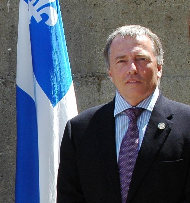 L'homme politique québécois Georges Mamelonet.